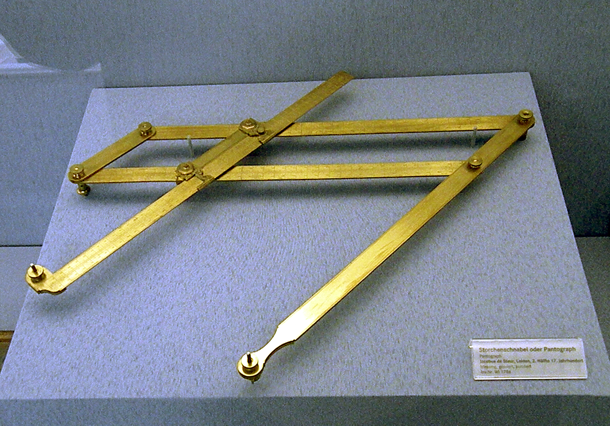 Пантограф. Экспонат Немецкого национального музея. Нюрнберг